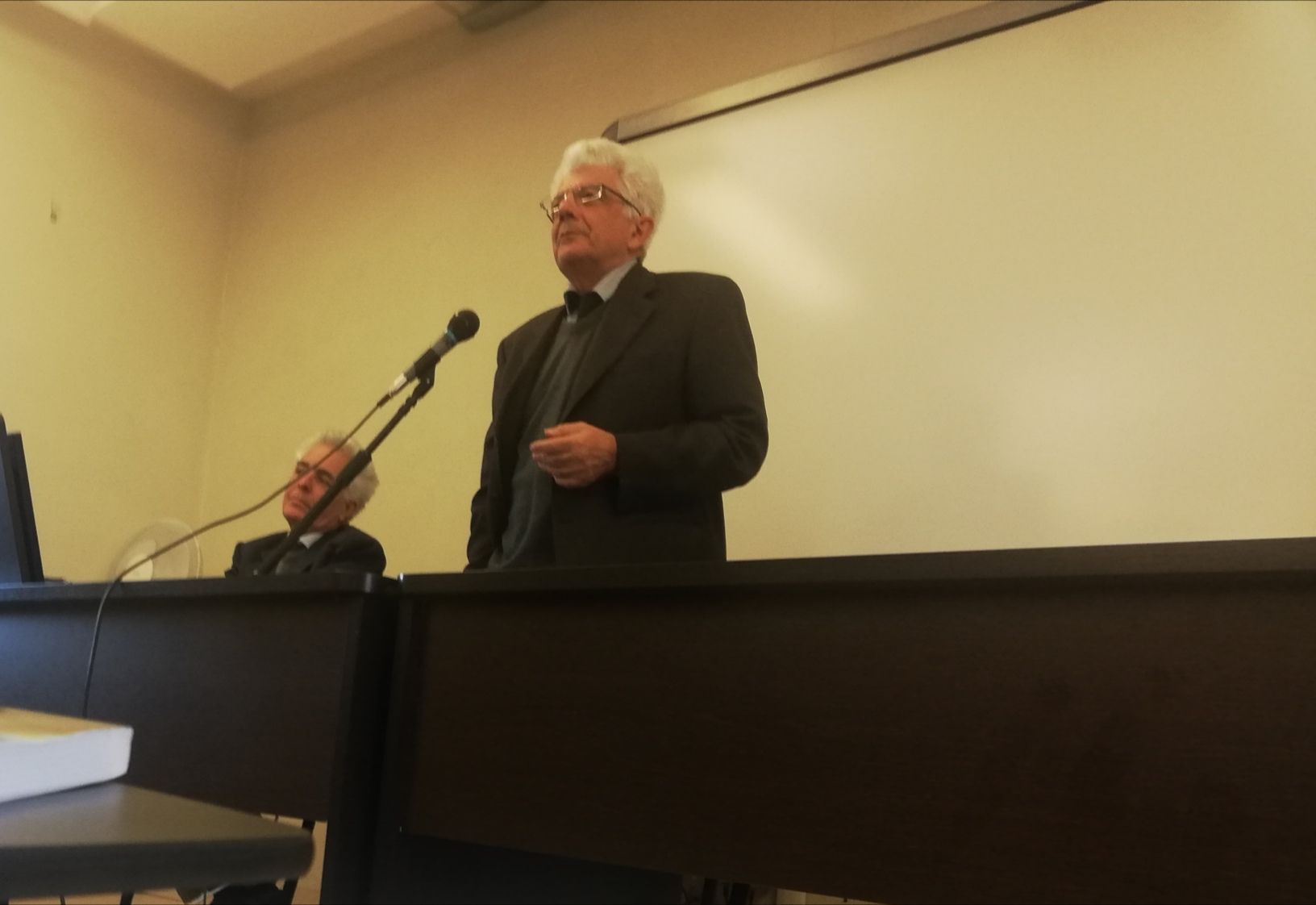 Alberto Febbrajo tiene una lezione all'Università degli Studi "Suor Orsola Benincasa"